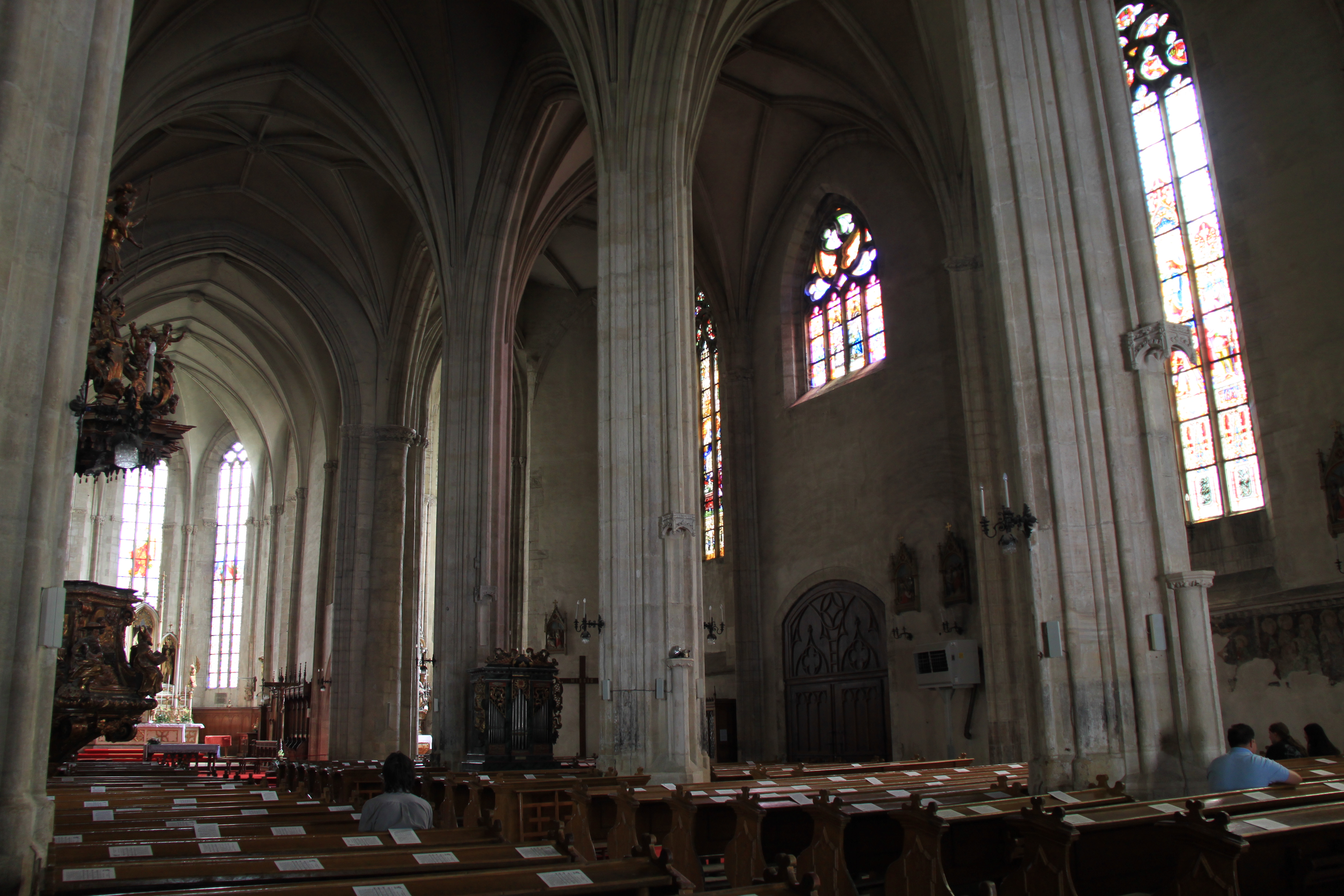 Cluj-Napoca - Iunie 2010